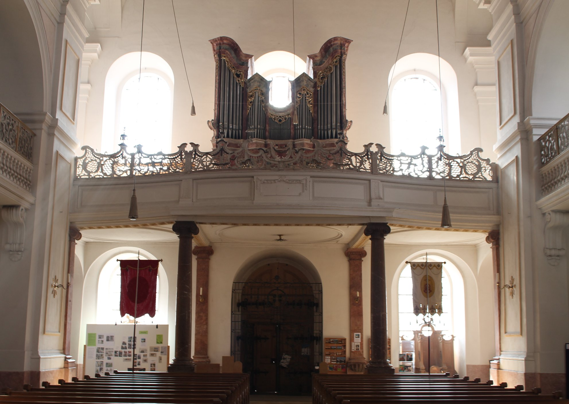 Orgel der Klosterkirche in Schlehdorf